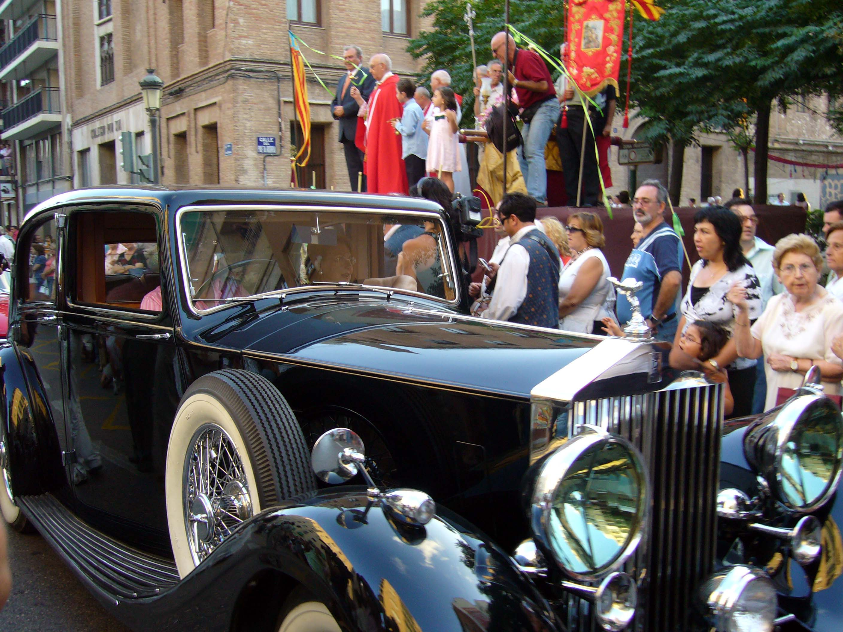 bendicion de san Cristobal Valencia